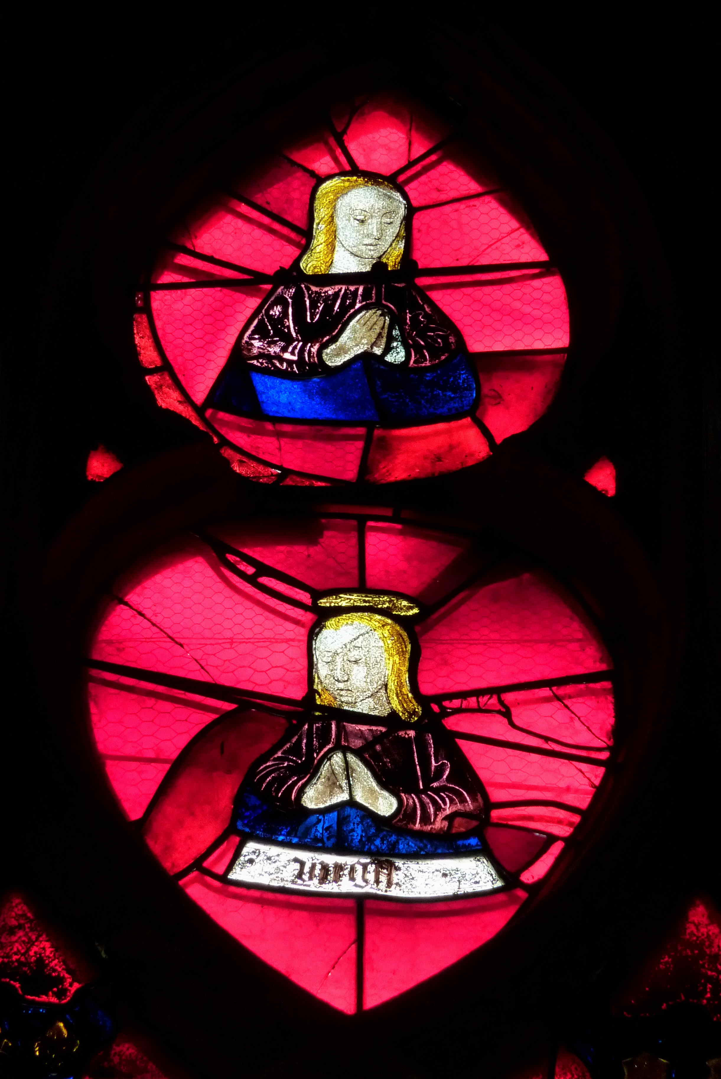 Katholische Pfarrkirche Notre-Dame-des-Marais in La Ferté-Bernard im Département Sarthe (Pays de la Loire/Frankreich), Bleiglasfenster (baie 12), aus der ersten Hälfte des 16. Jahrhunderts, von François Delalande; 1849 restauriert; Darstellung: Szenen der Legende des hl. Julien und des hl. Nikolaus; Maßwerk (Ausschnitt)